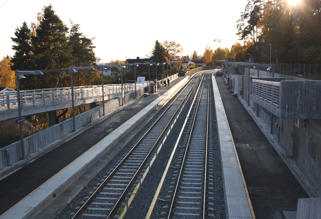 Montebello T-banetasjon sett gangbroen ved stasjonen.